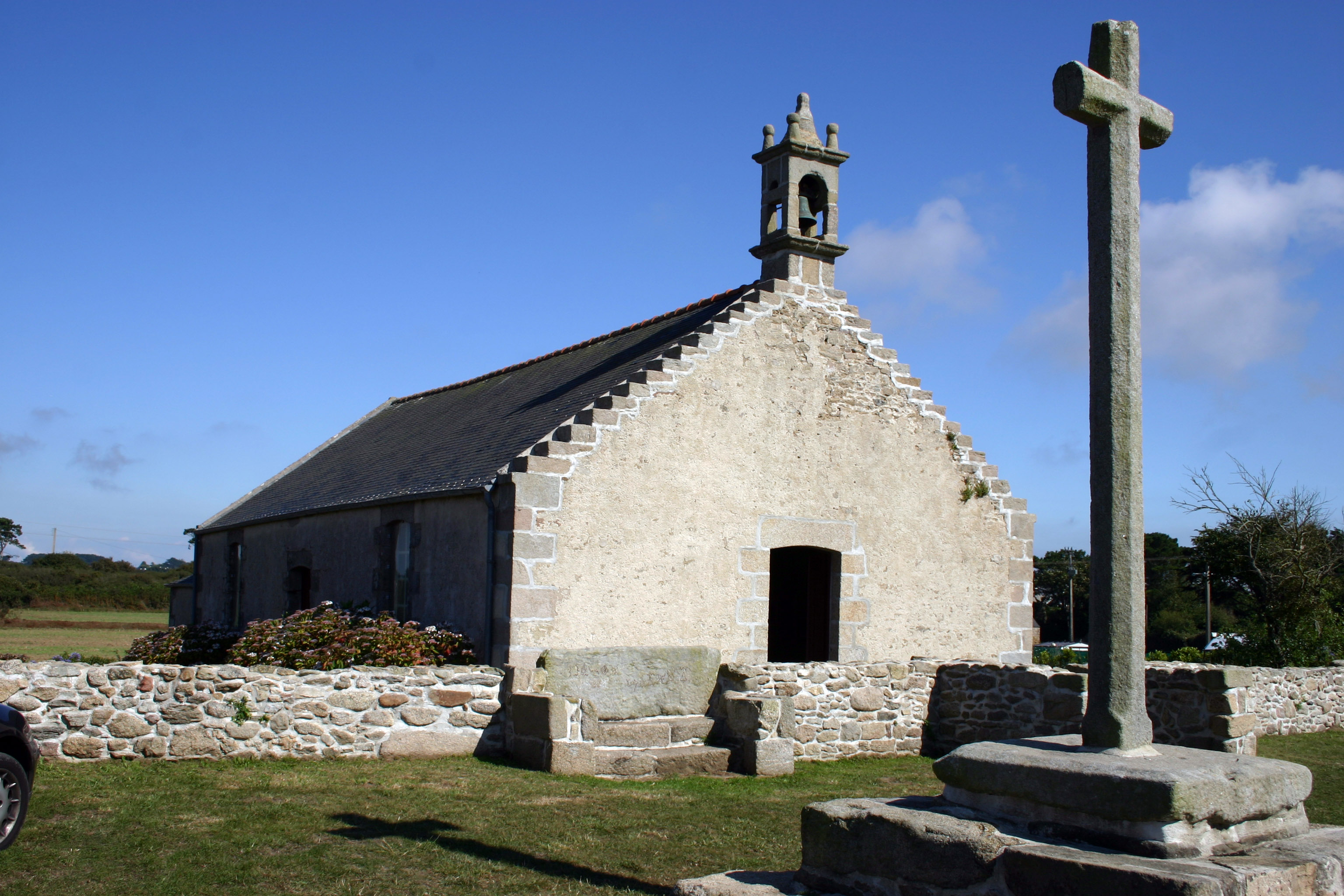 Chapelle Sainte-Maguerite Landéda Finistère Bretagne France